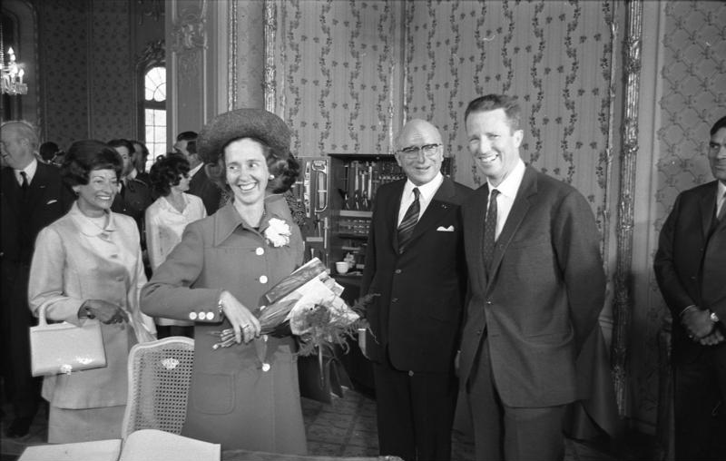 Staatsbesuch des belgischen Königspaares. Empfang im Schloß Benrath